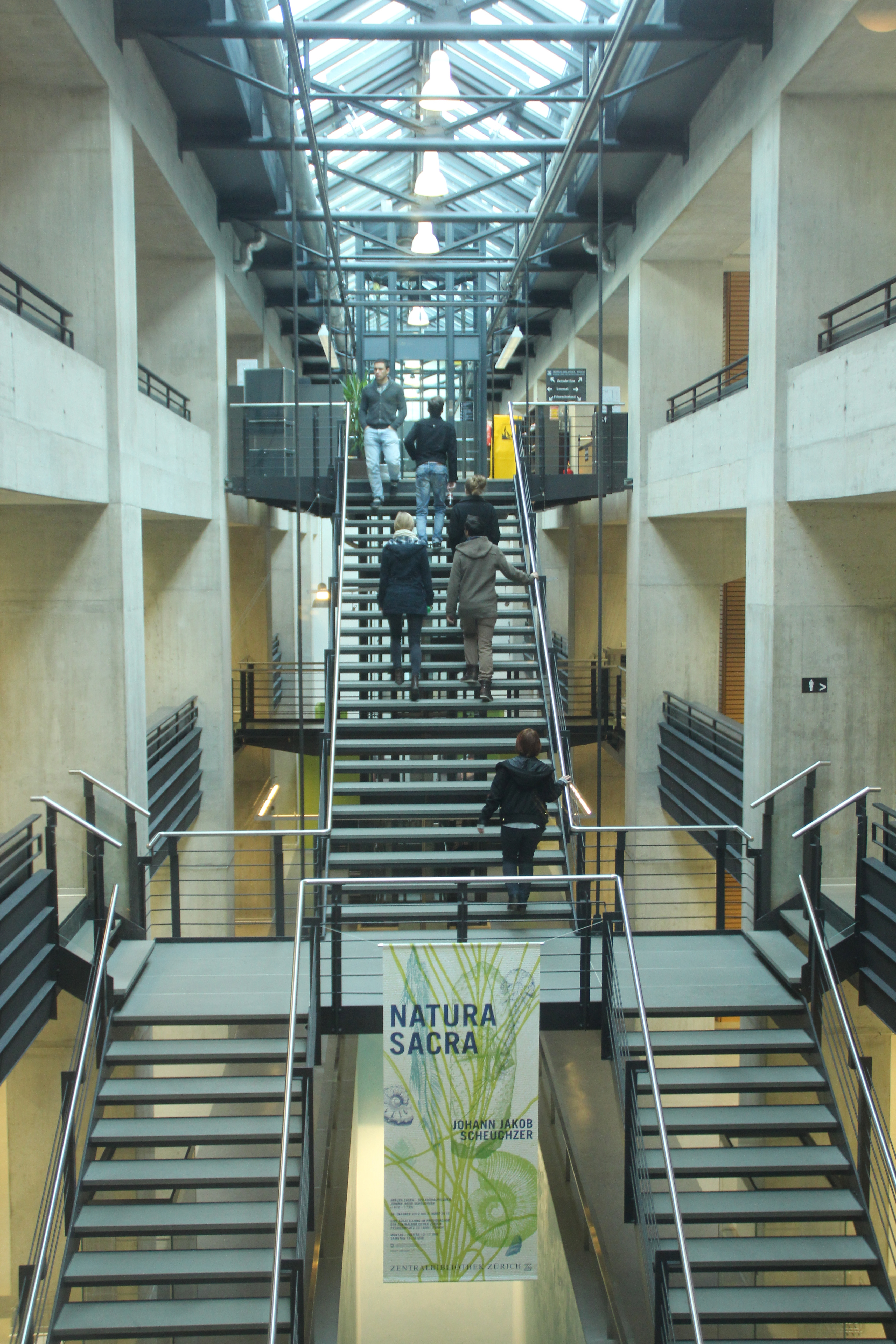 Zentralbibliothek Zürich, Innentreppe